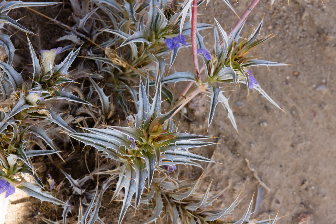 Blepharis grossa-1458